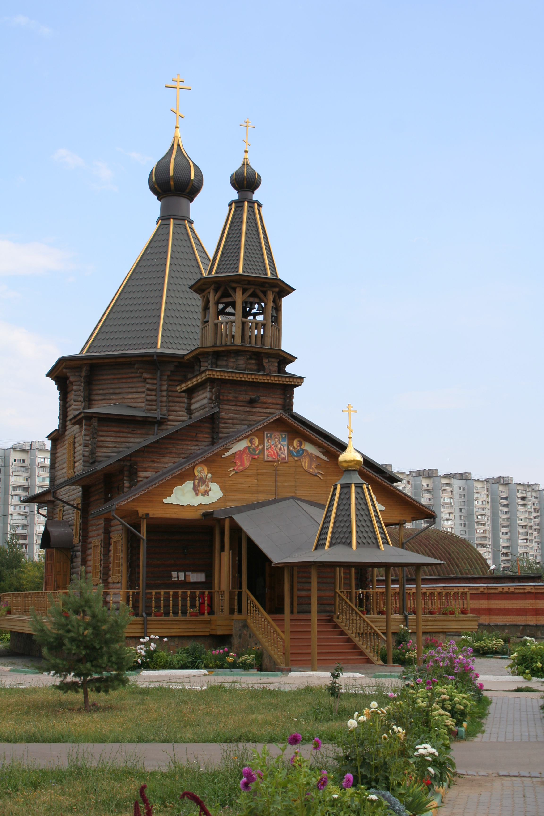 Holzkirche der Gottesmutter-Ikone „Dreihändige“, Moskau.